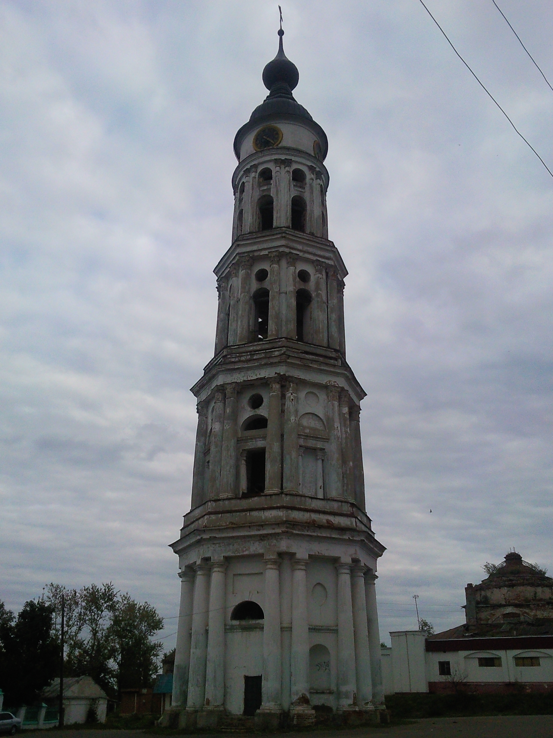 Колокольня Троицко-Знаменской церкви. Лежнево. Ивановская область.